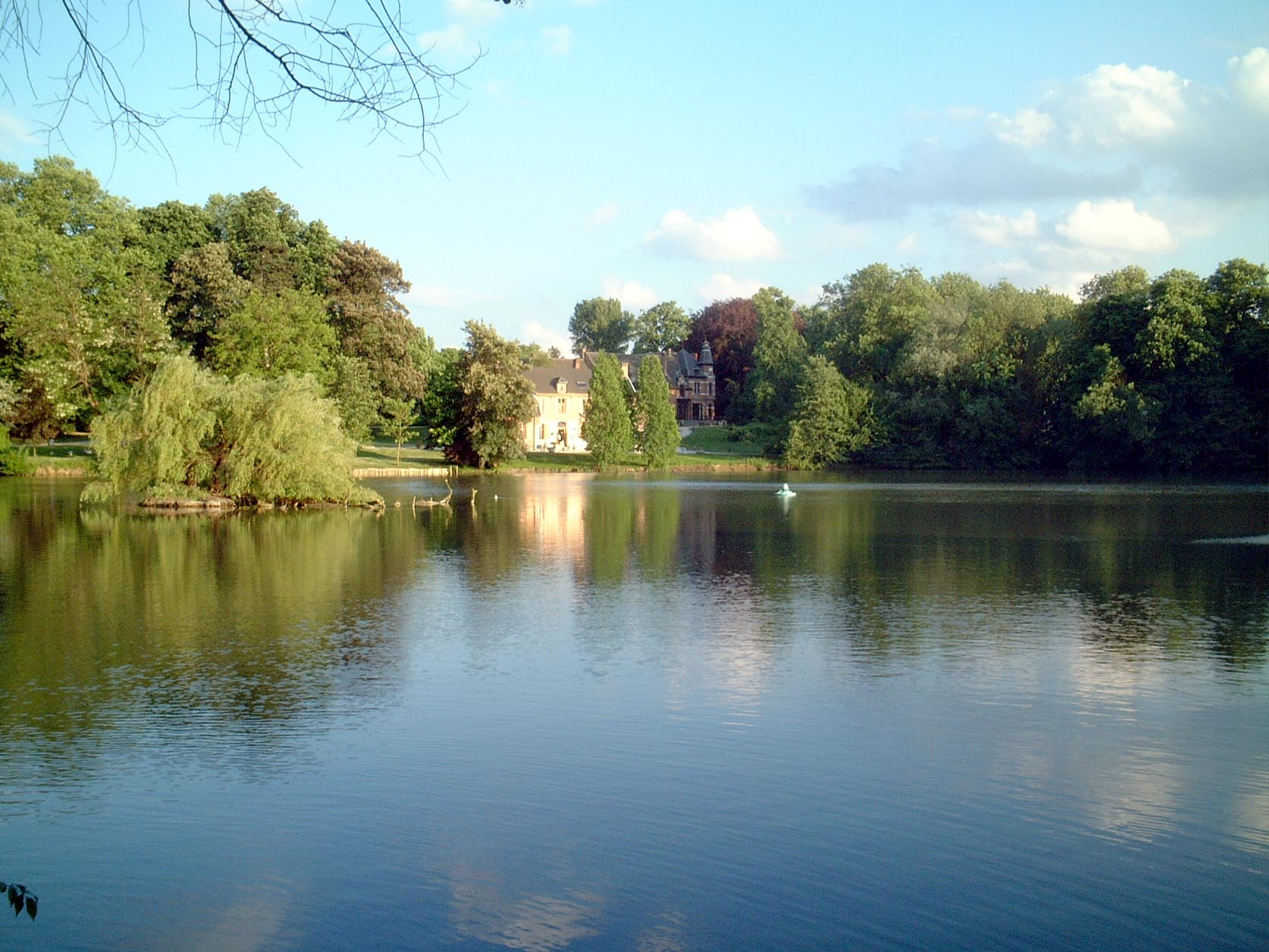 (nl) Pastorie (voormalige)